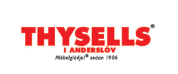 Thysells Möbler Logo